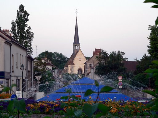 Le rond-point de la Fontaine sur la Francilienne et le Vieux Village de Lésigny en arrière-plan. (Seine-et-Marne).